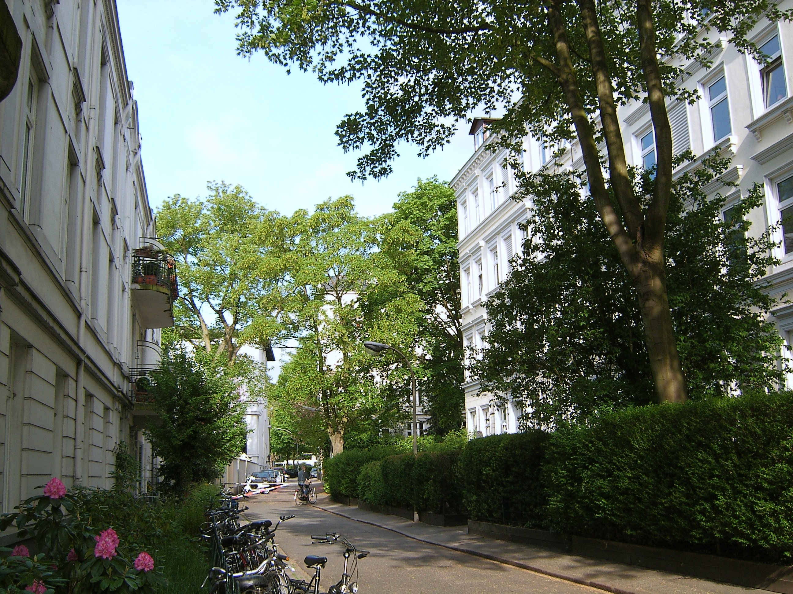 Bildbeschreibung: Hamburg, Pöseldorf, Heimweg Fotograf: selbst Datum: 15.5.2006